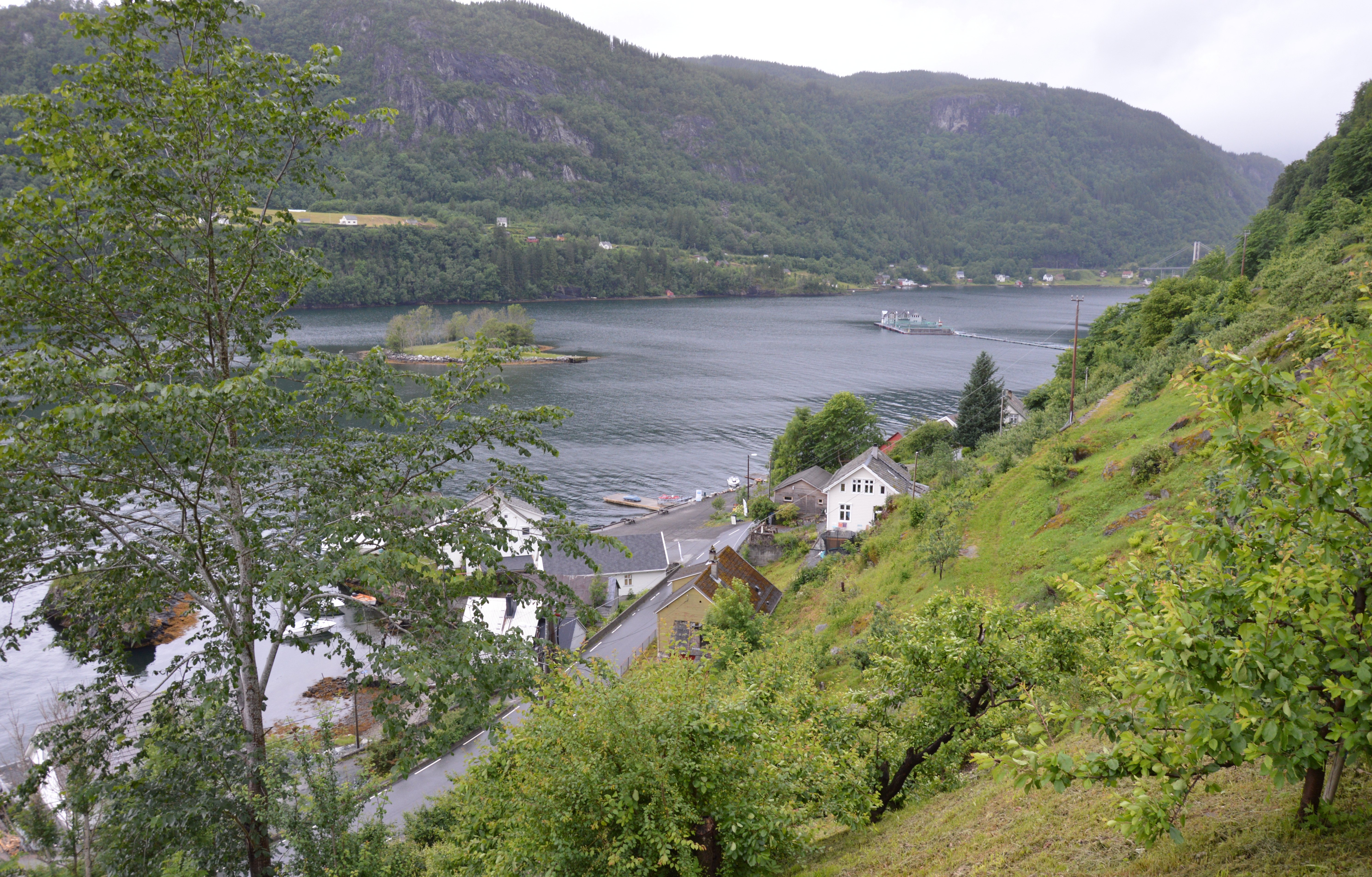 Steinsto, Blick auf den Fyksesund